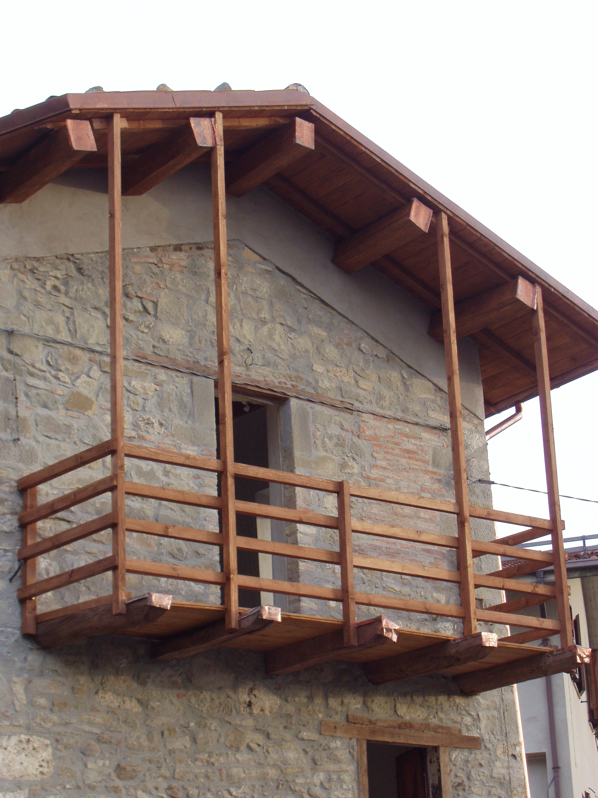 Descriprion: Gafio in legno a Leofara (Valle Castellana) author: Lucio De Marcellis